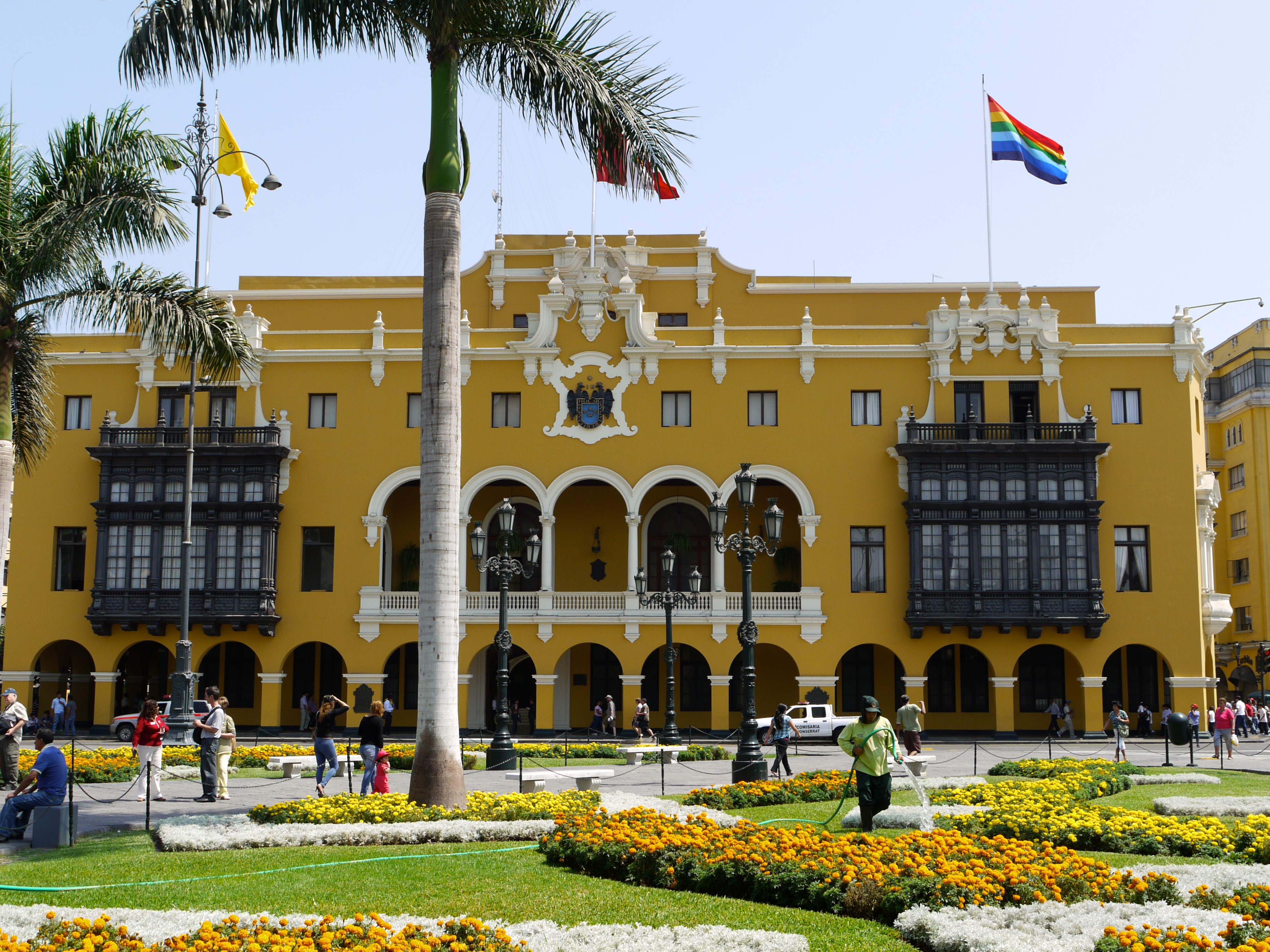 Palacio Municipal de Lima. Pérou, Lima, Plaza Mayor, la Municipalidad